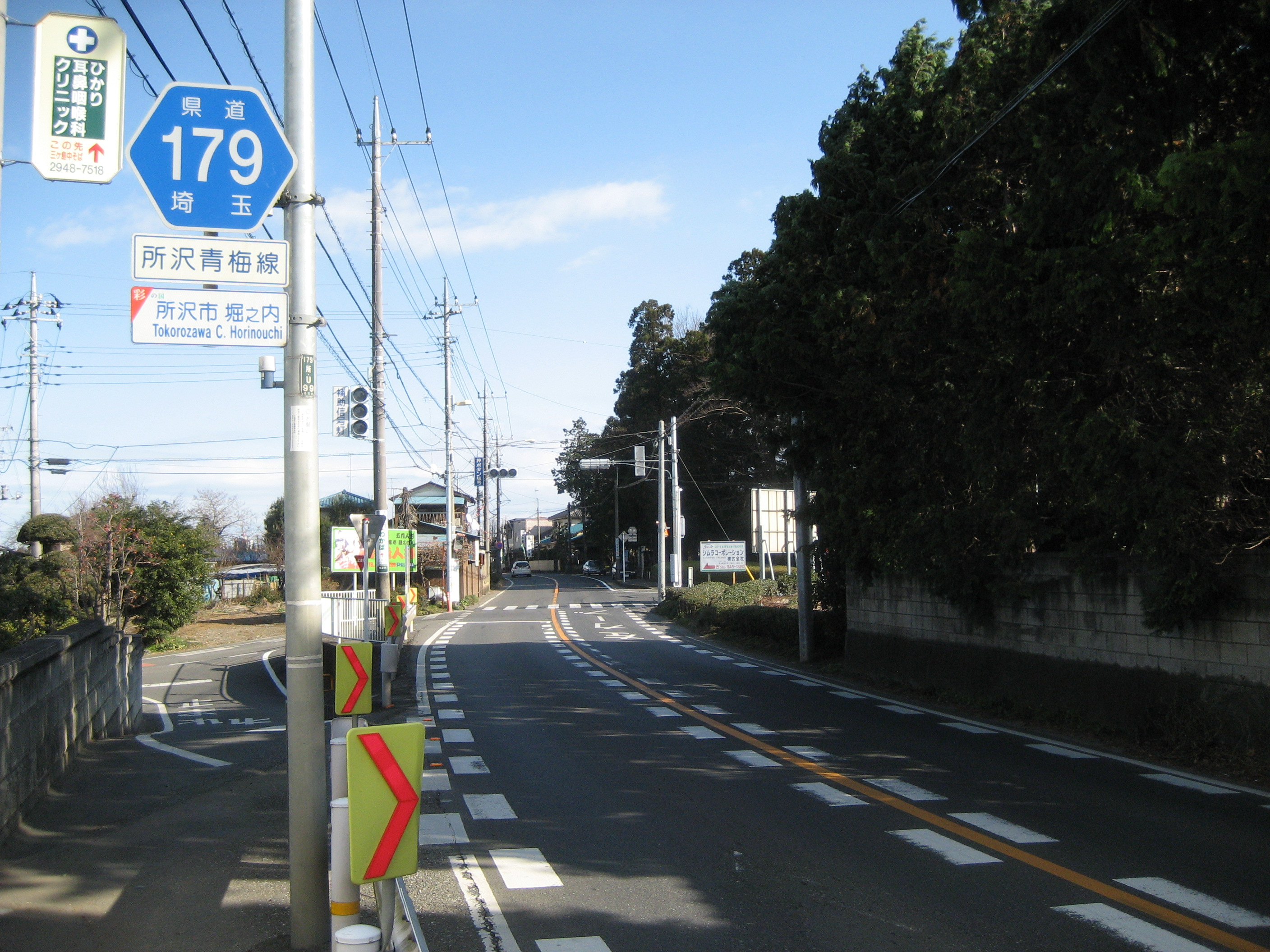 埼玉県道179号線所沢市内